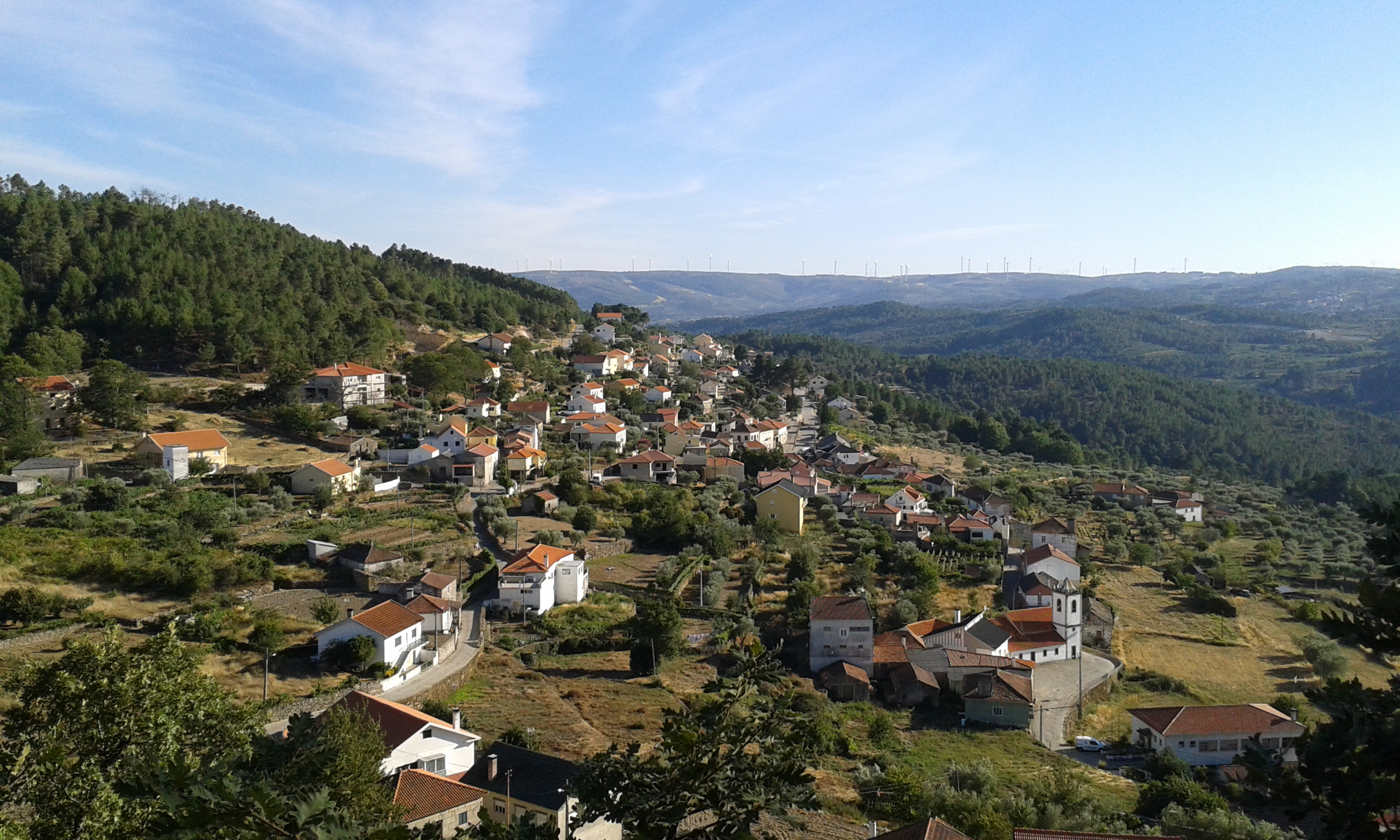 Vista de Castelo, Moimenta da Beira